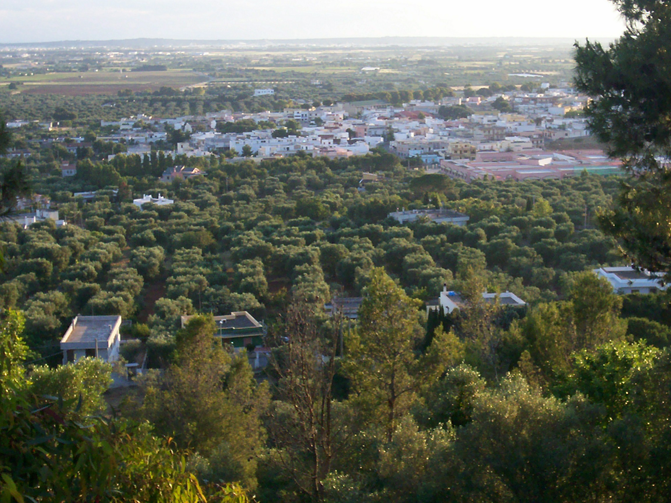 Veduta aerea di Casarano dall'altura della Campana, provincia di Lecce - Puglia (Italia)